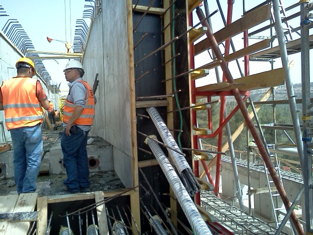 כבלי פלדה לדריכה בתוך שרוולים בבטון דרוך בדריכת אחר. גשר 10, עמק הארזים ירושלים